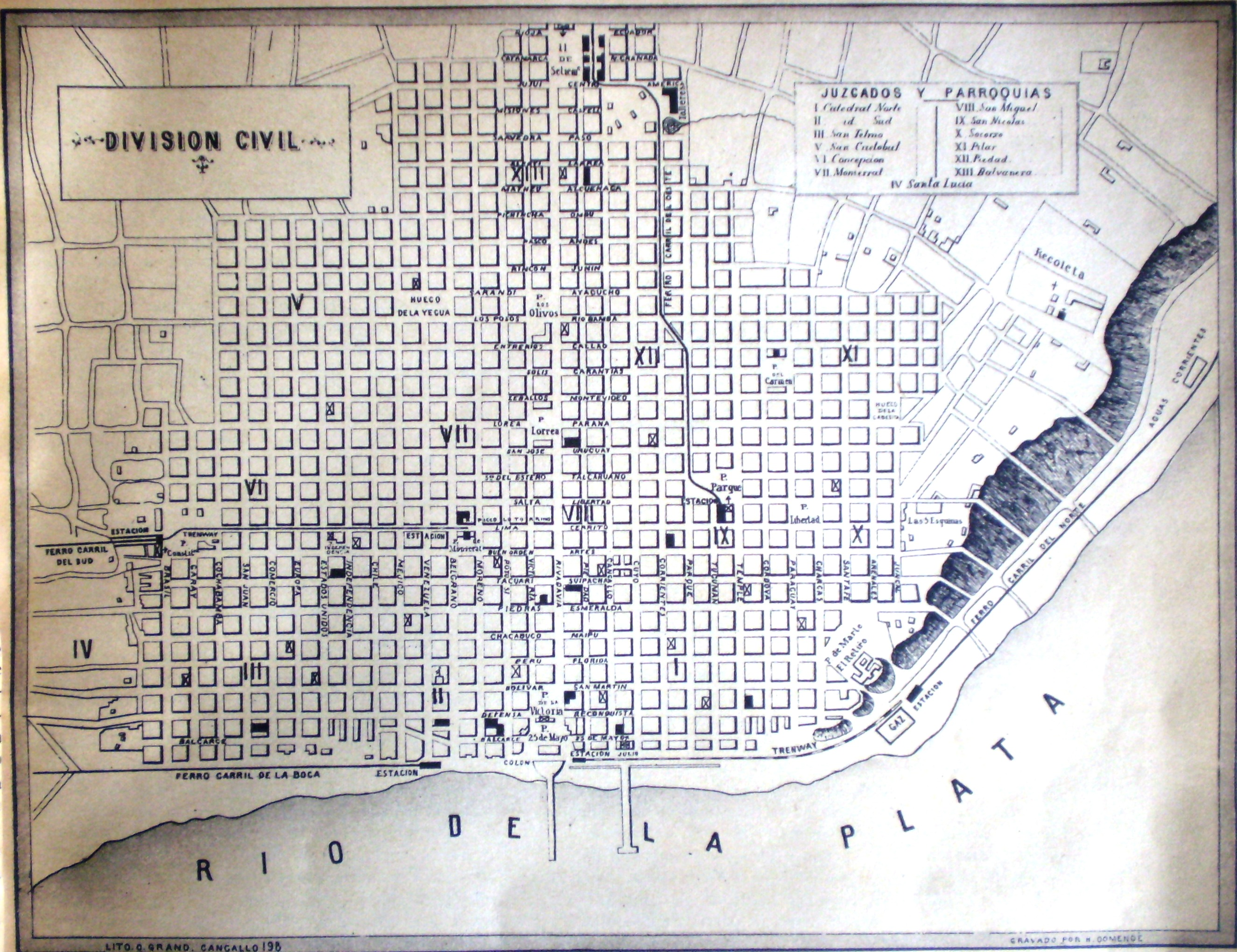 Plano de la división civil de la ciudad de Buenos Aires realizado por Nicolás Grondona en 1870.